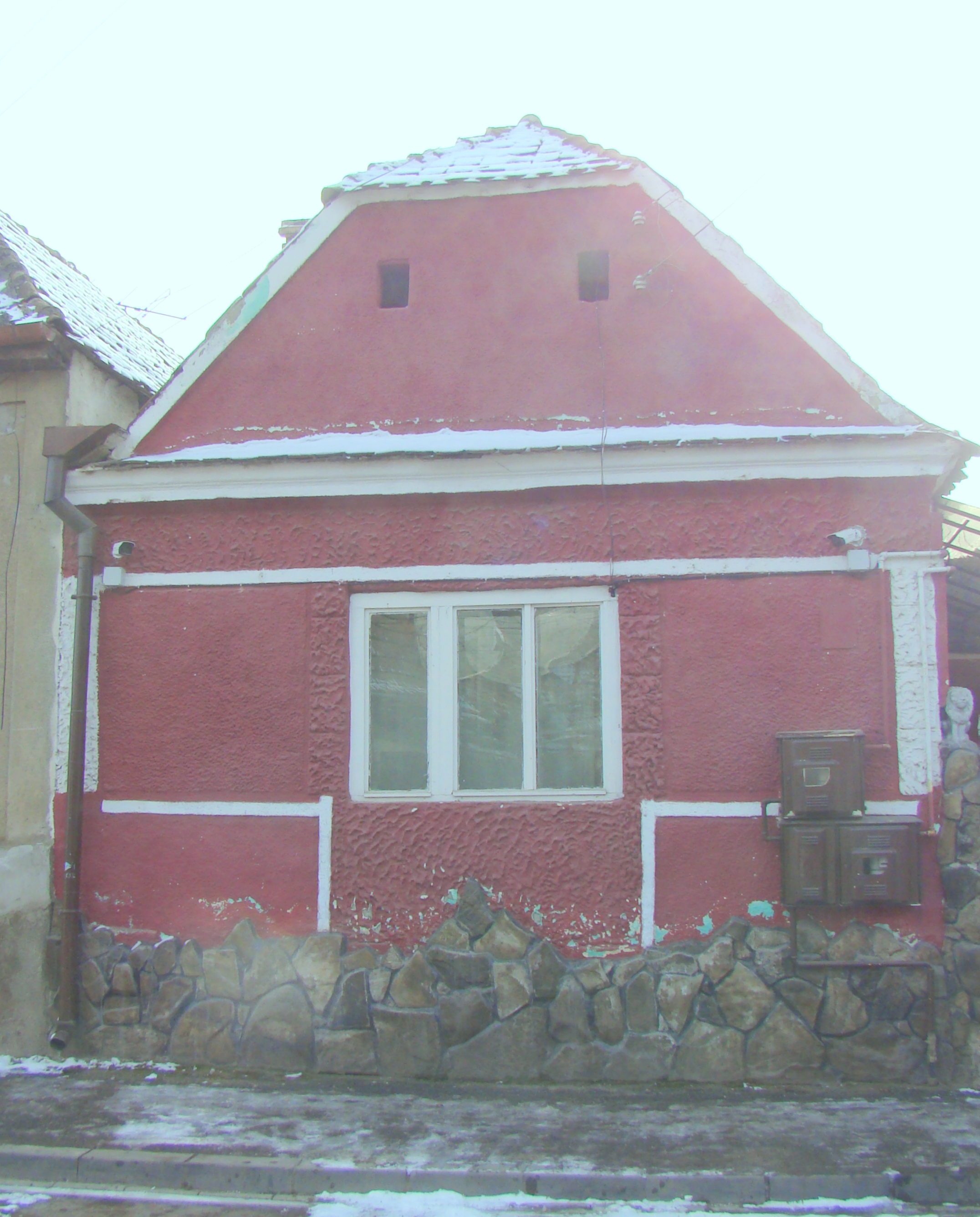 Casă, municipiul Sighișoara, str. Ștefan cel Mare 25 sec. XIX